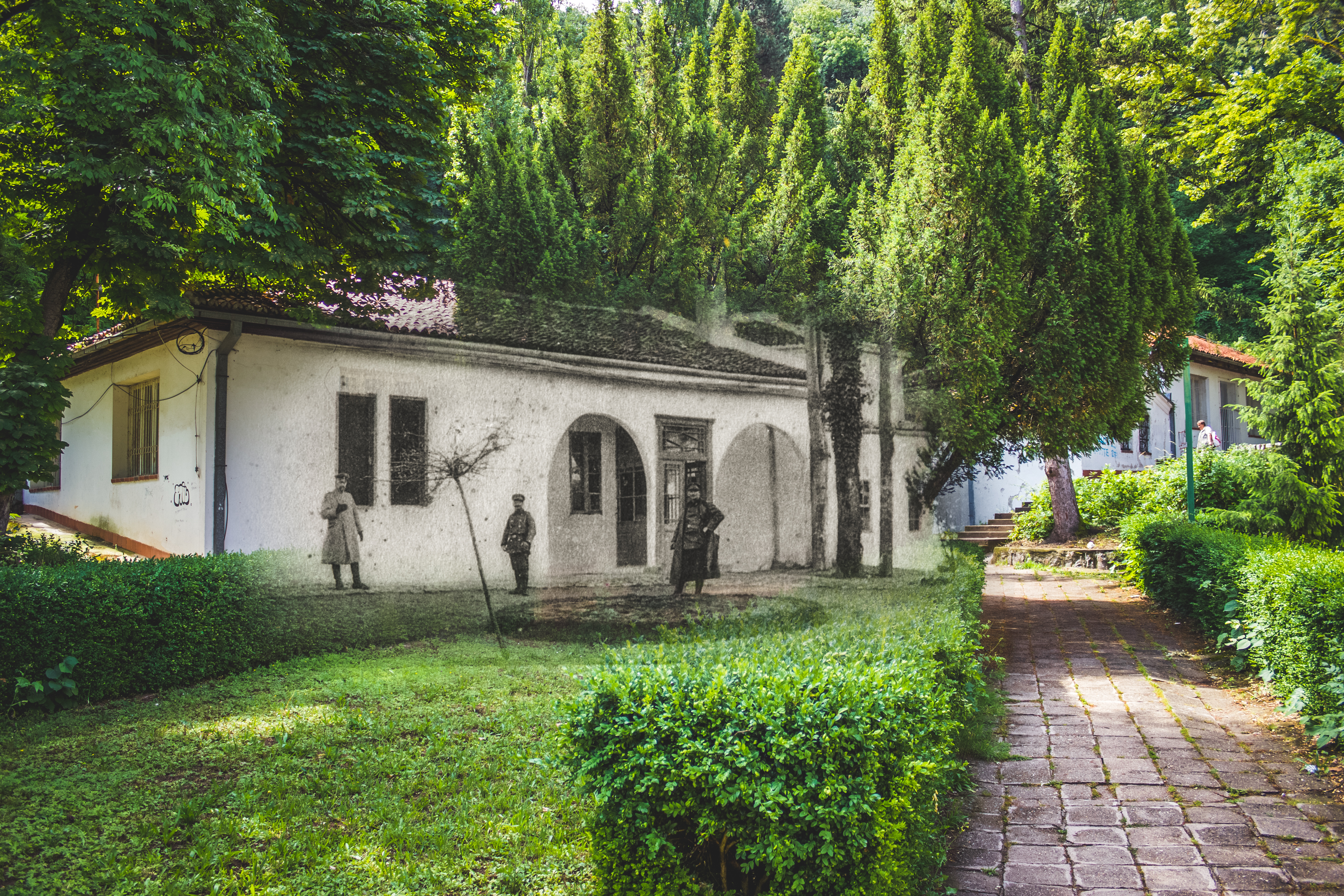 Srpski (latinica): Niška Banja, Staro kupatilo- zadnja strana